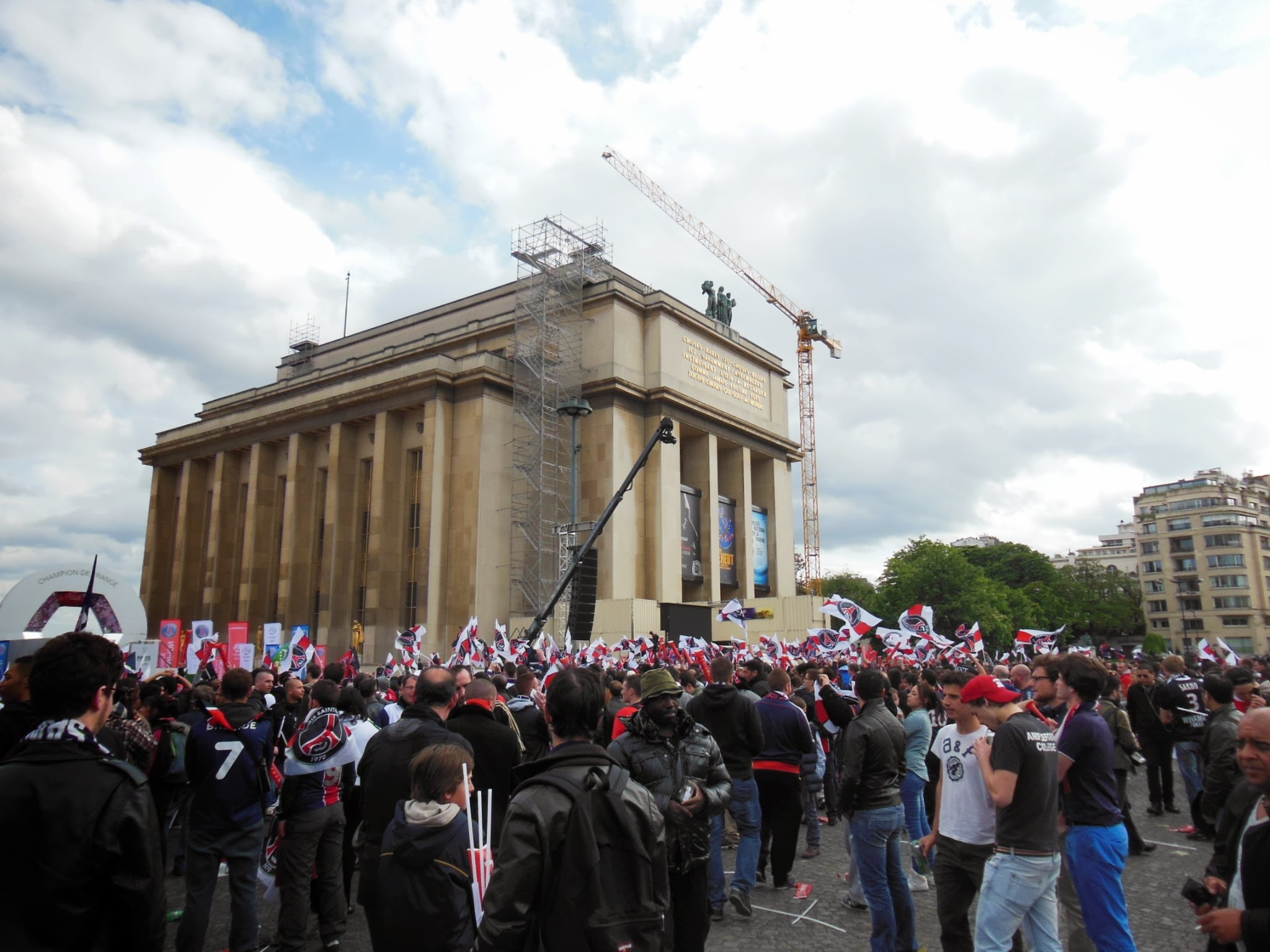 Festa PSG!!